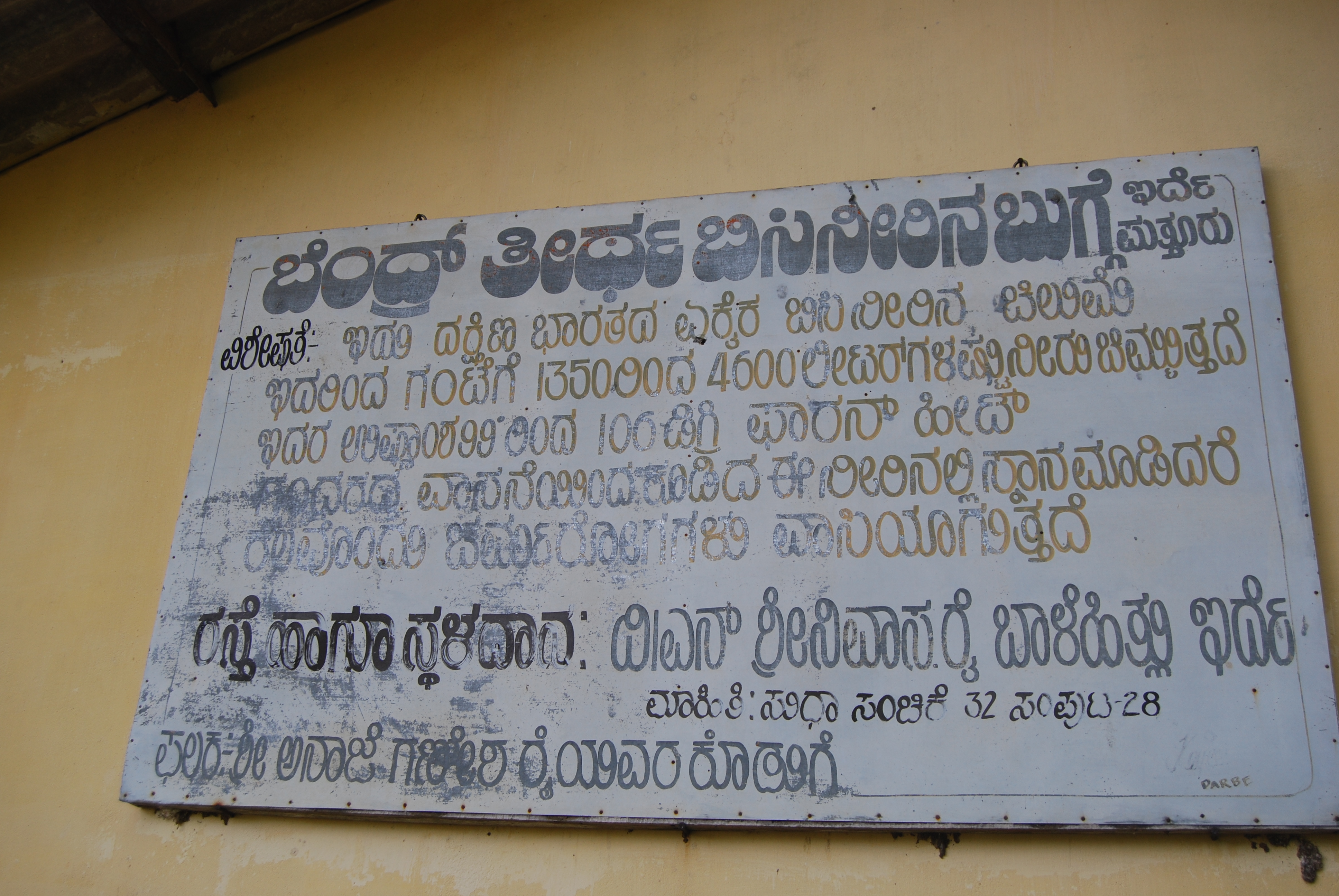 ಕನ್ನಡ: ಬೆಂದ್ರ್ ತೀರ್ಥ (ಬಿಸಿನೀರ ಬುಗ್ಗೆ ) ಪುತ್ತೂರಿಗೆ ೧೫ ಕಿ. ಮಿ ದೂರದಲ್ಲಿ ಒಂದು ನೈಸರ್ಗಿಕ ಬಿಸಿನೀರಿನ ಬುಗ್ಗೆಯಿದೆ